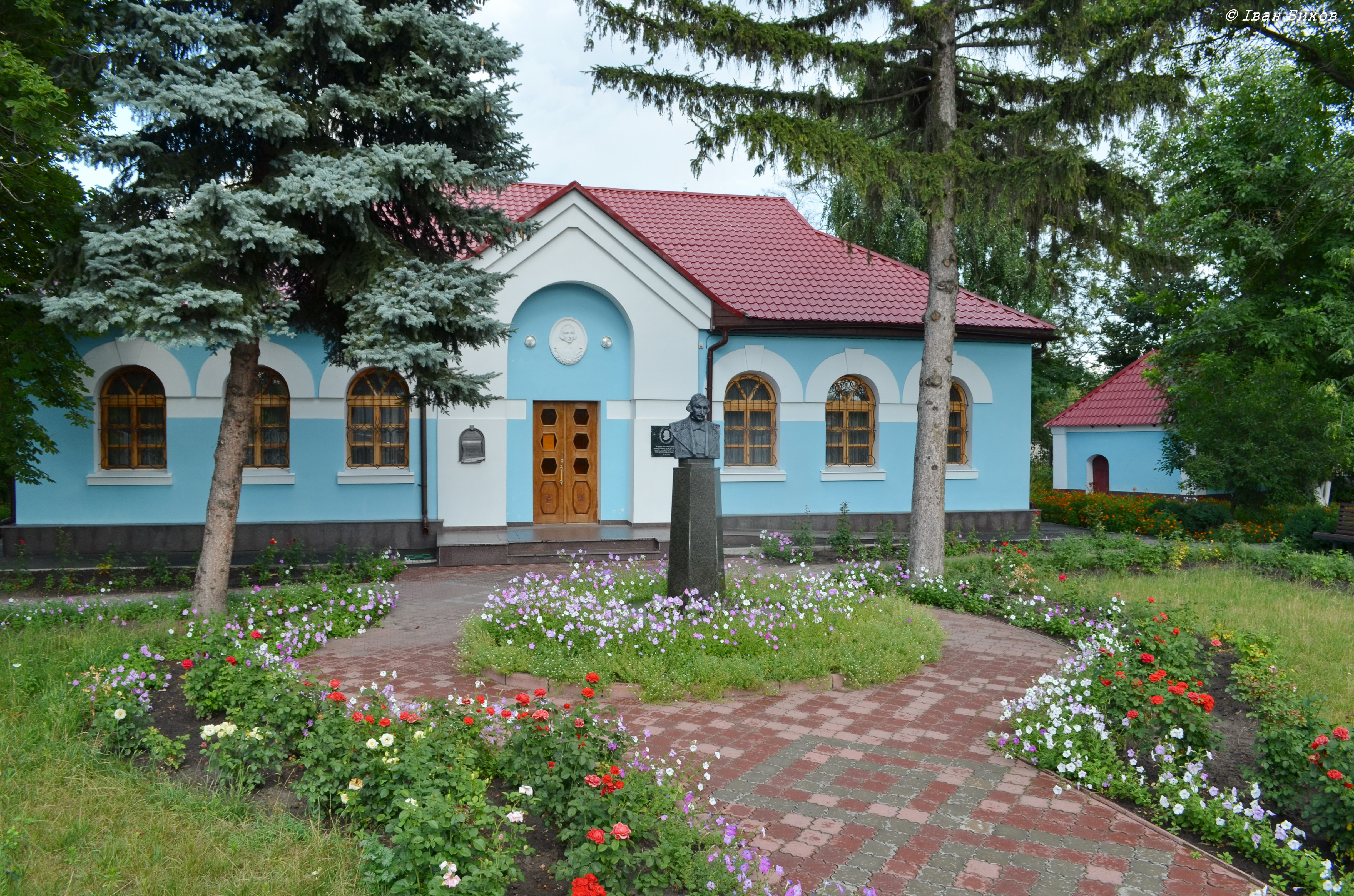 Пам'ятник-бюст М.В.Гоголю, Великі Сорочинці